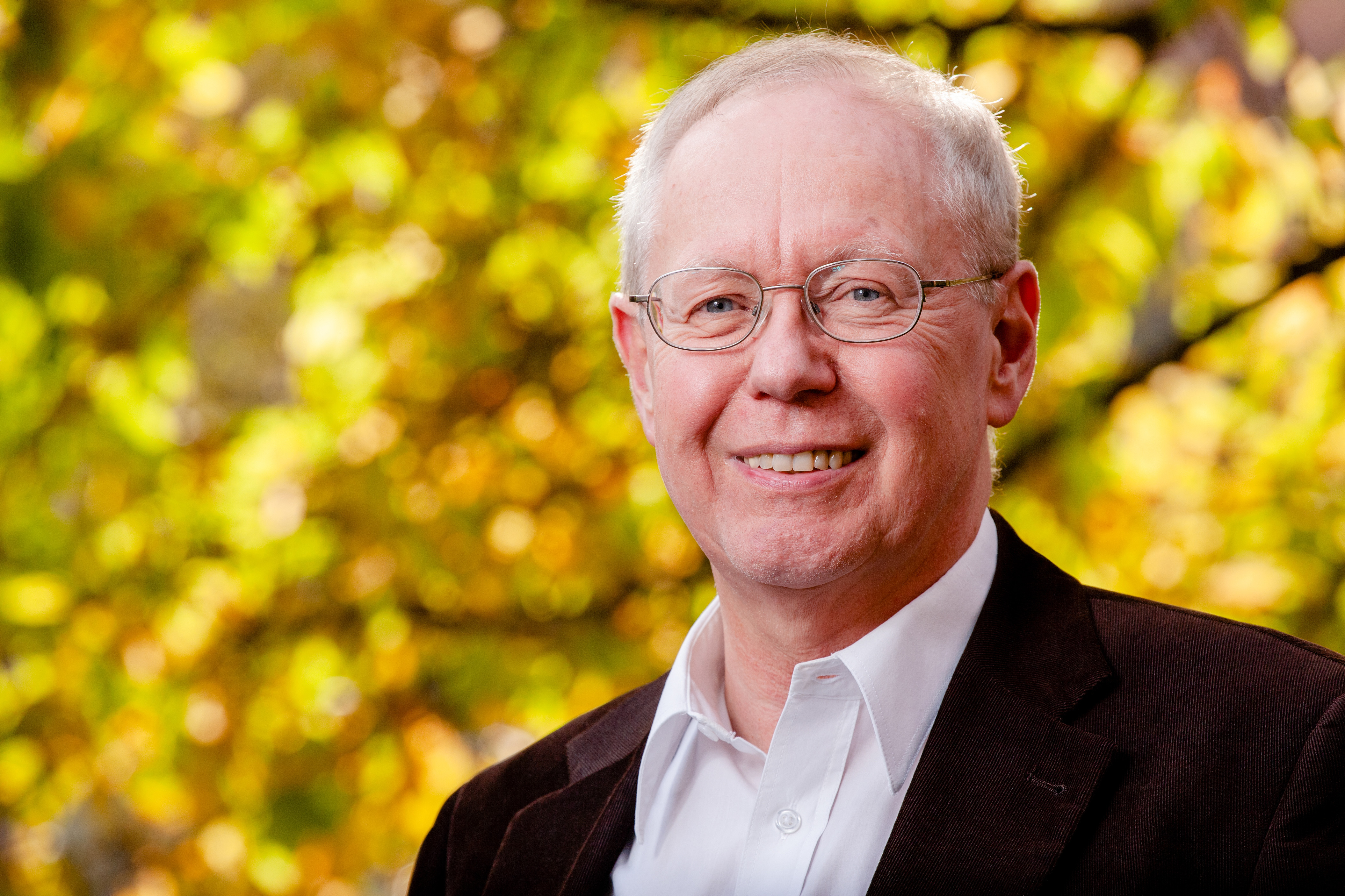 Ecologist and evolutionary biologist Bruno Streit, 2018.